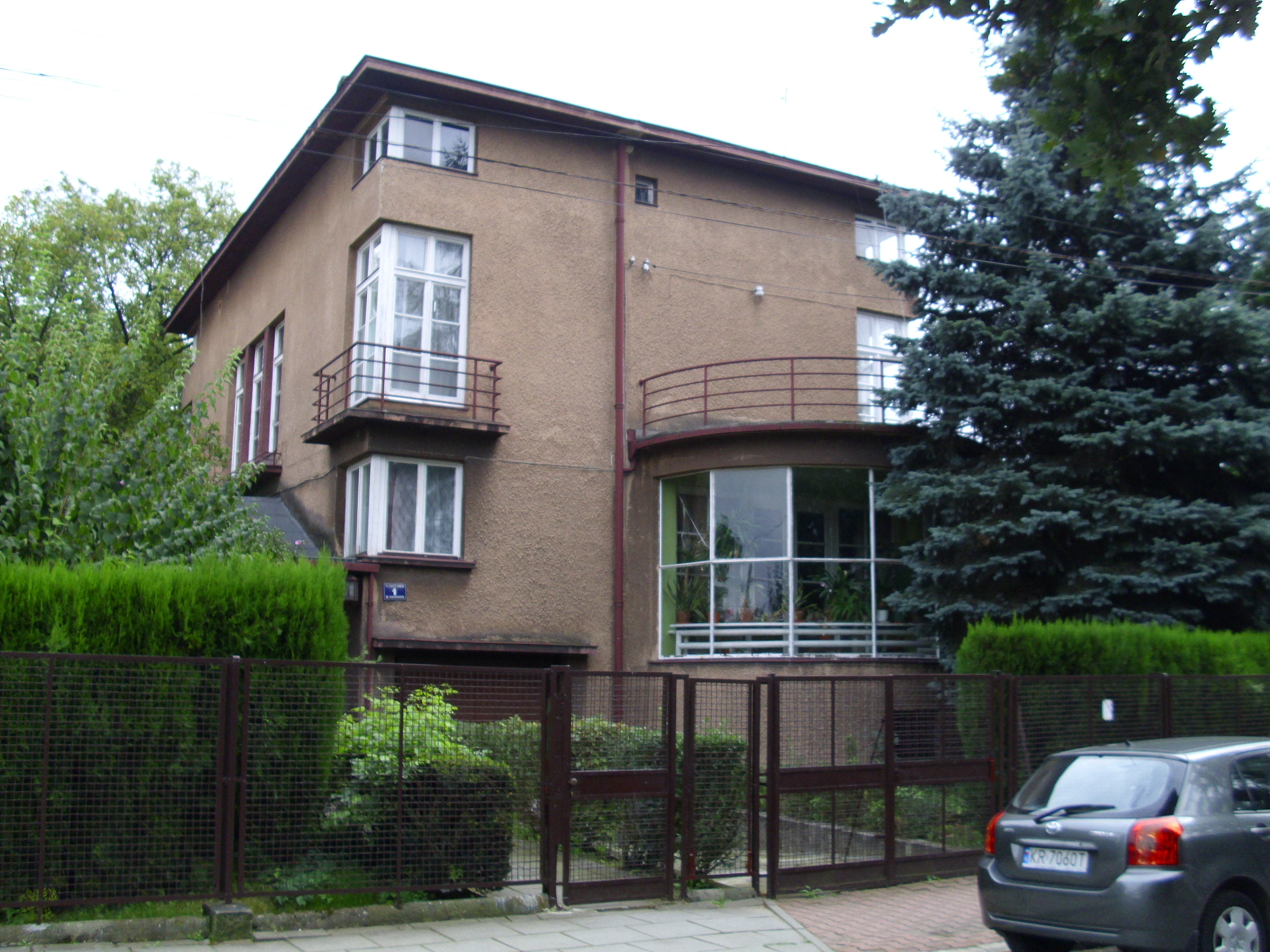 Osiedle Cichy Kącik w Krakowie, budynek przy ul. Domeyki 1